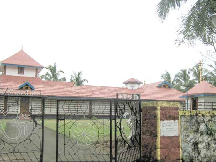 പഴയന്നൂർ കൊണ്ടാഴി തൃതംതളിക്ഷേത്രം